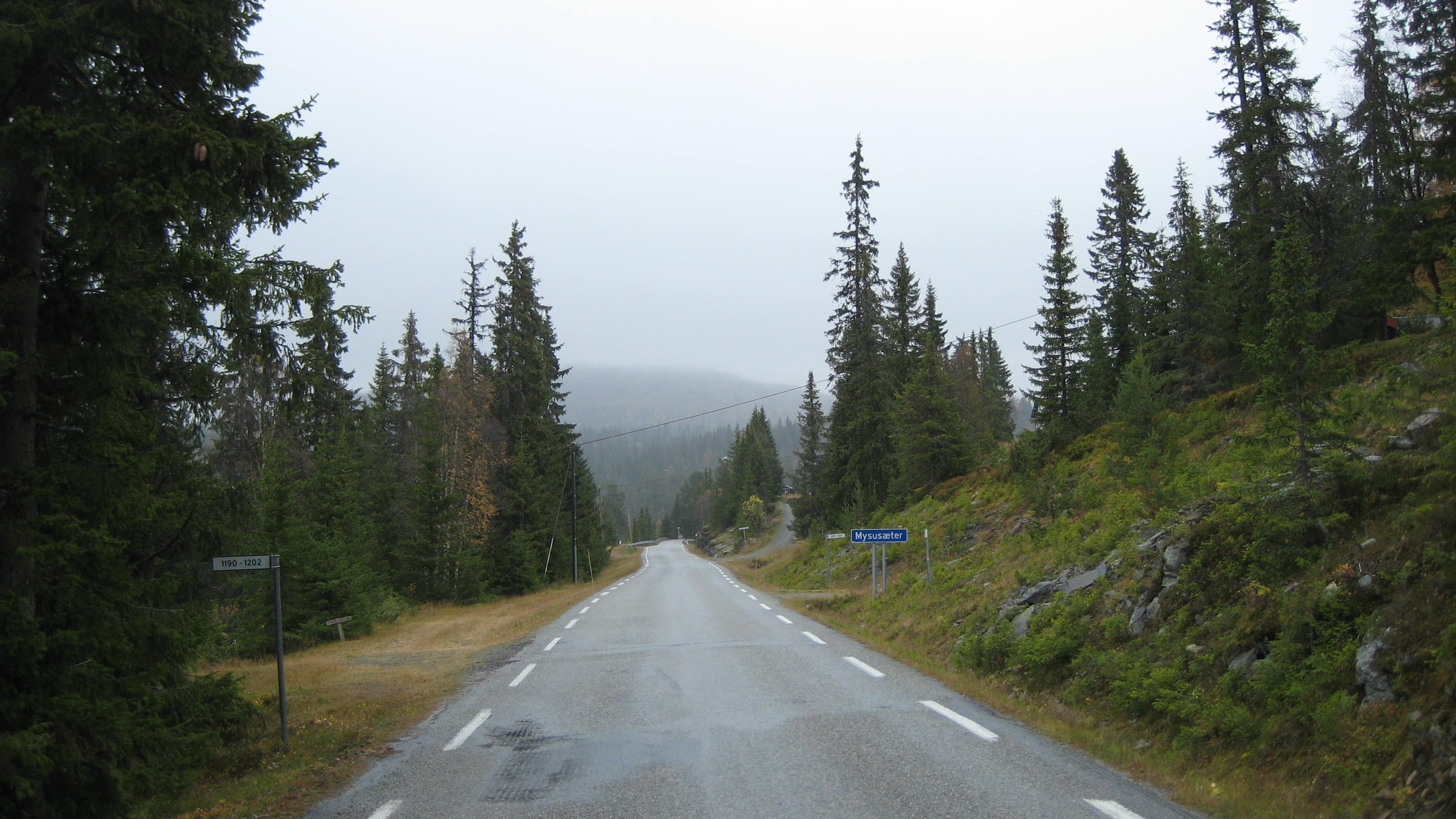 Mysuseter